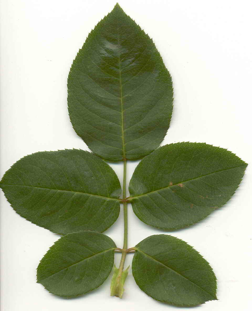 Foto tirada cunha Nikon E8800